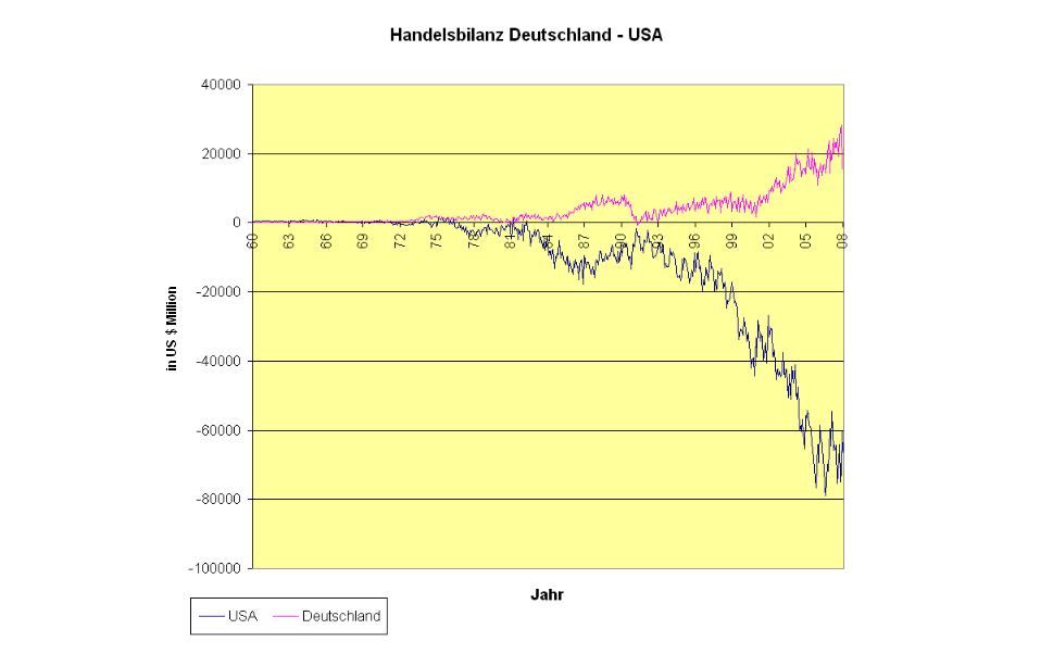 Darstellung der Handelsbilanzen von Deutschland und USA